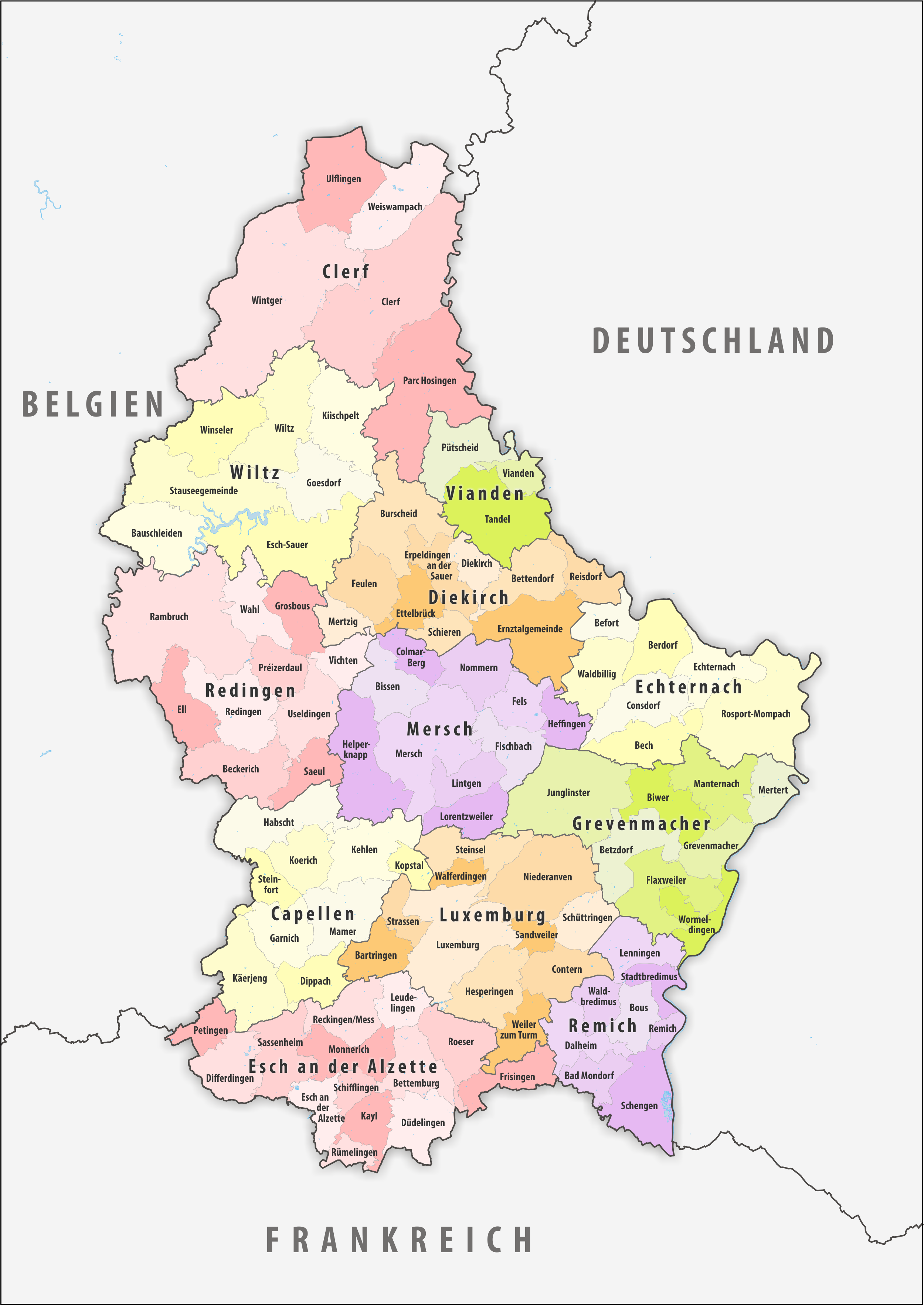 Politische Gliederung Luxemburgs